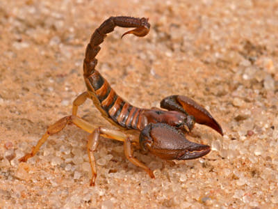 Opisthophthalmus carinatus